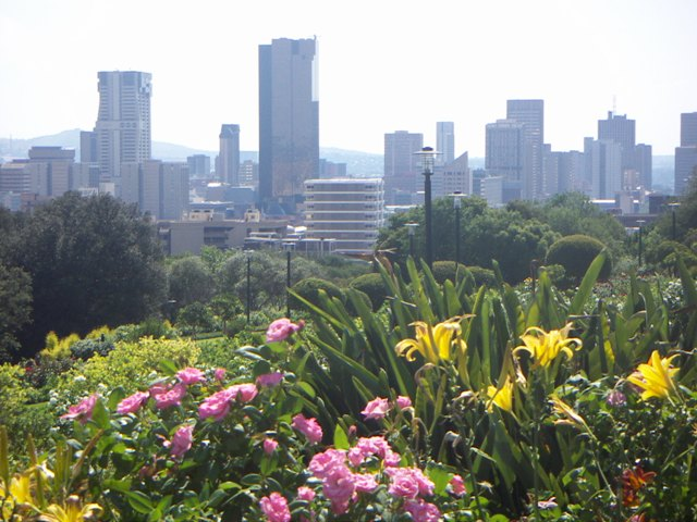 Die stadshorison van Pretoria.